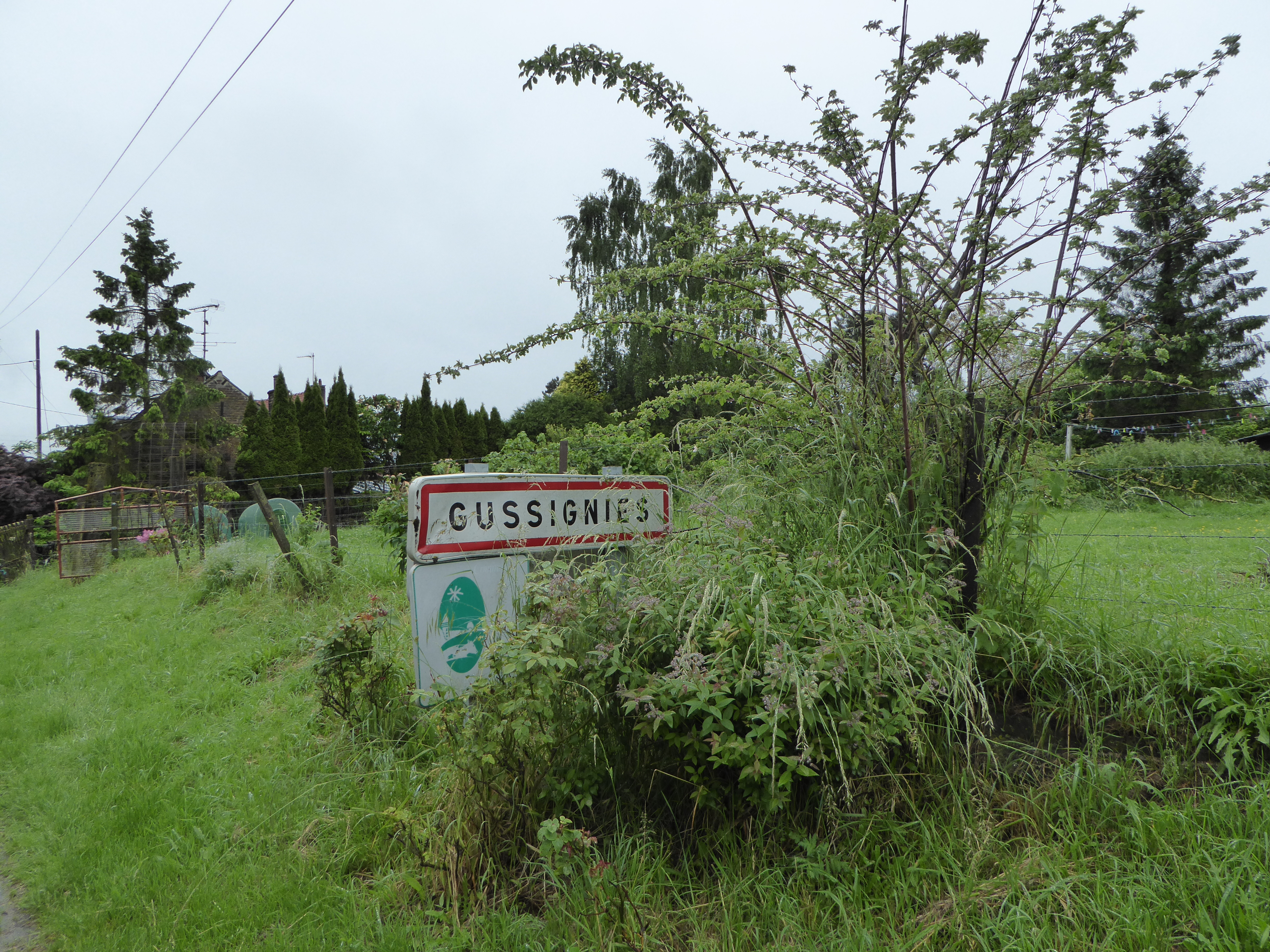 Gussignies , Nord, Nord-Pas-de-Calais-Picardie.- France.